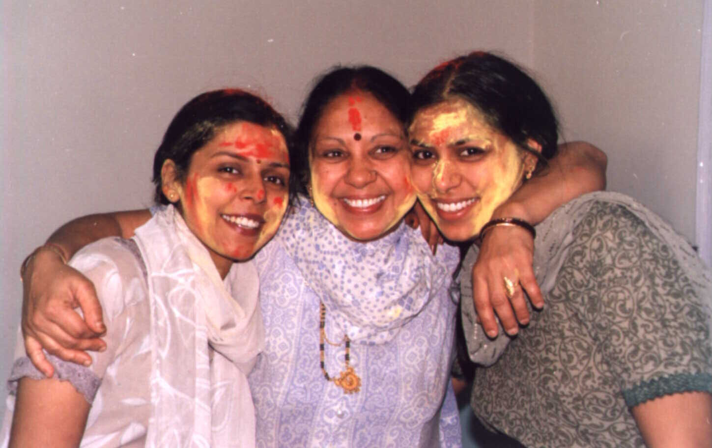 Tre kvinner som er blitt oversprøytet med farge under Holi-feiringen.